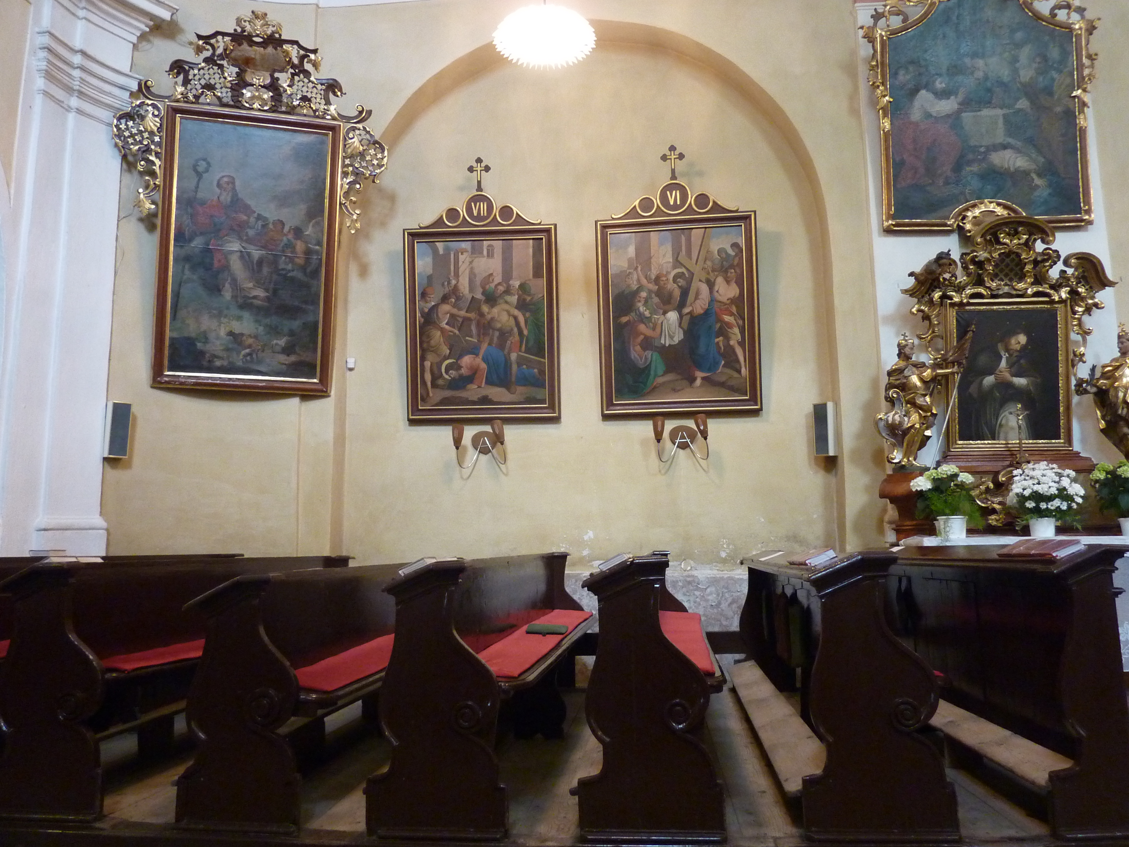 Prázdné lavice v kostele Narození svatého Jana Křtitele v Přibyslavi v zadní části levé poloviny hlavní lodi. Město Přibyslav. Okr.Havlíčkův Brod. Kraj Vysočina.